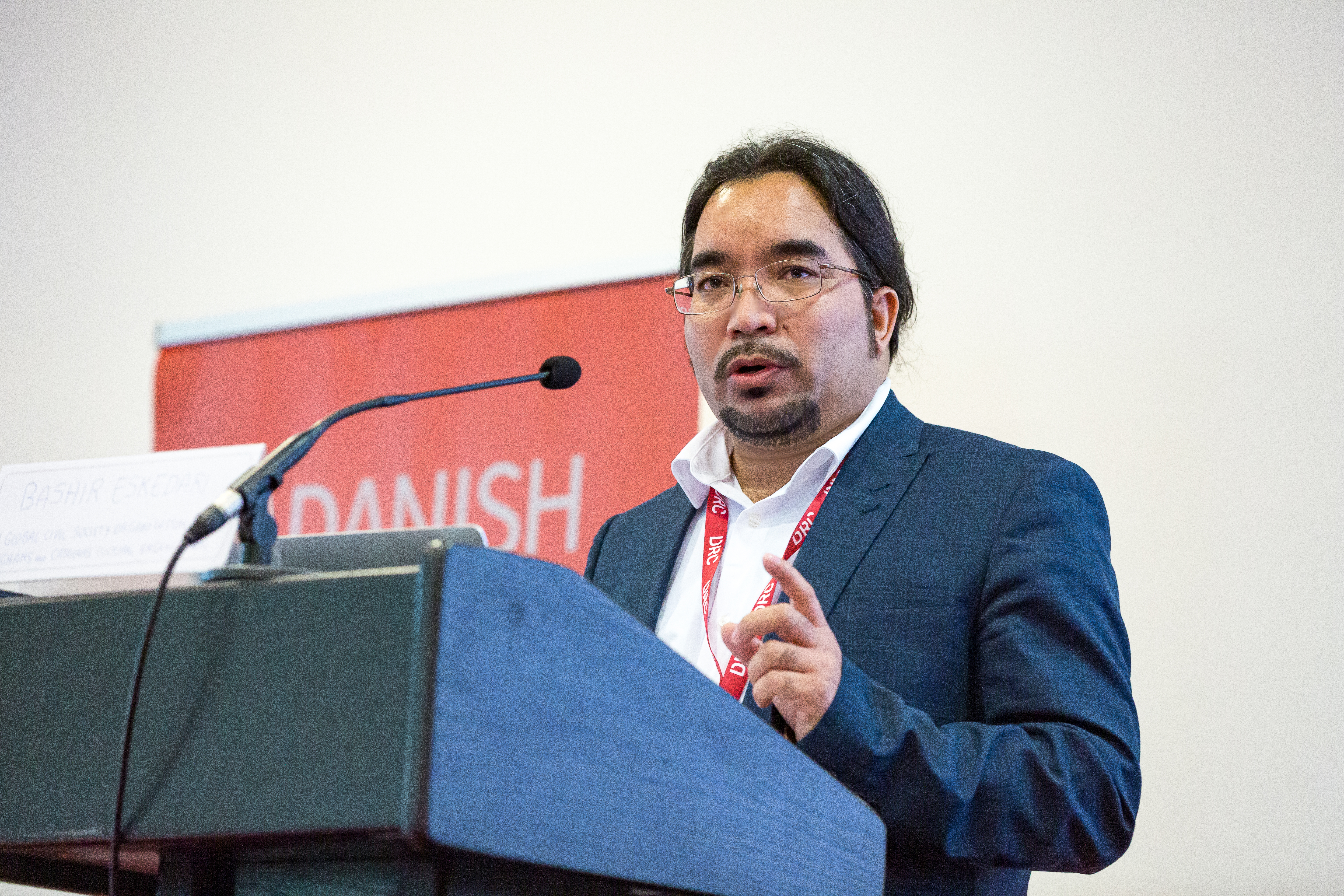 این عکس اجازه بشیر اسکندری قابل استفاده است